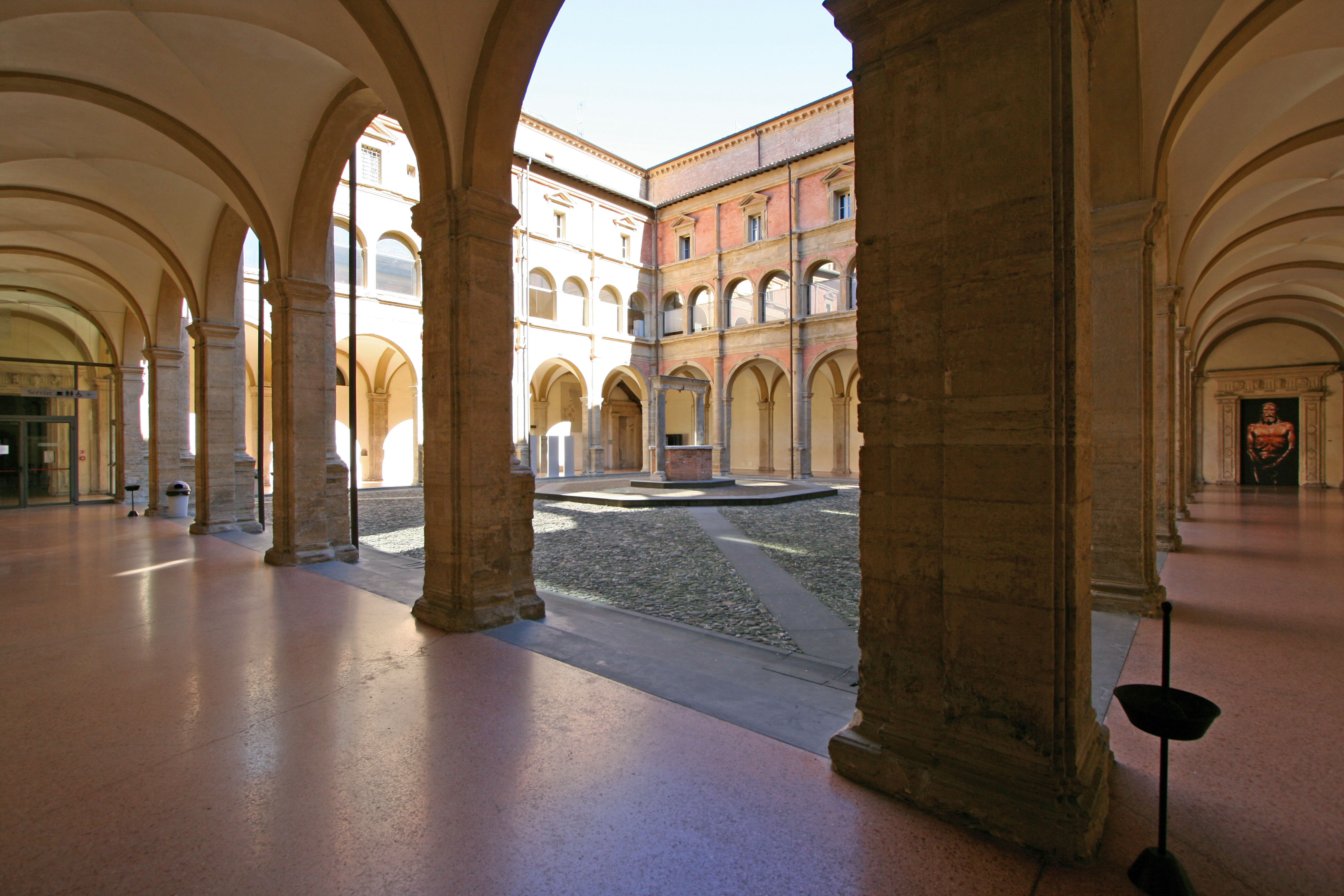 Chiostro di San Giovanni in Monte, già sede del carcere cittadino, ora sede di tre dipartimenti dell'Università di Bologna (Archeologia, Discipline Storiche e Paleografia e Medievistica).